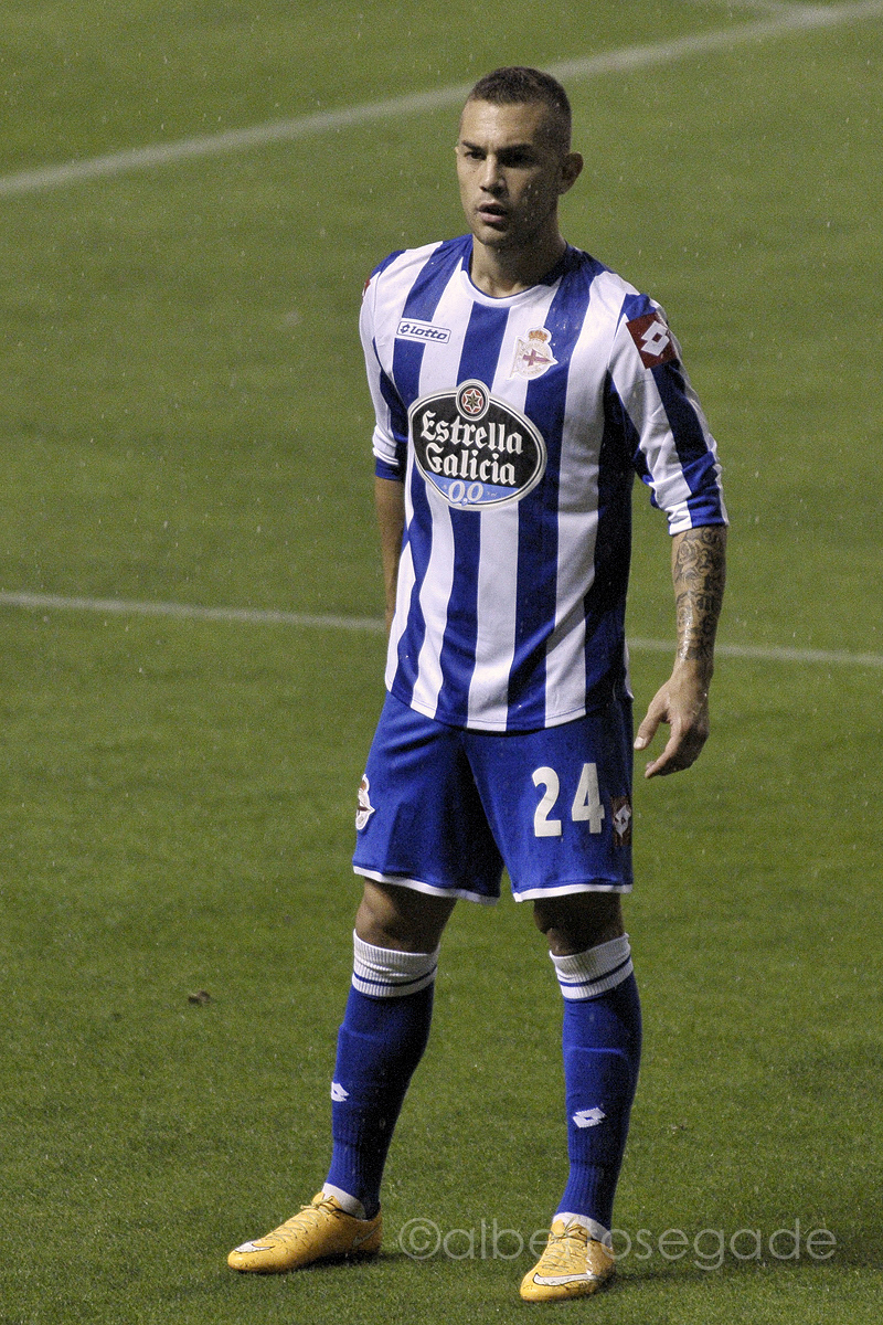 Luis Fariña playing for Deportivo La Coruna